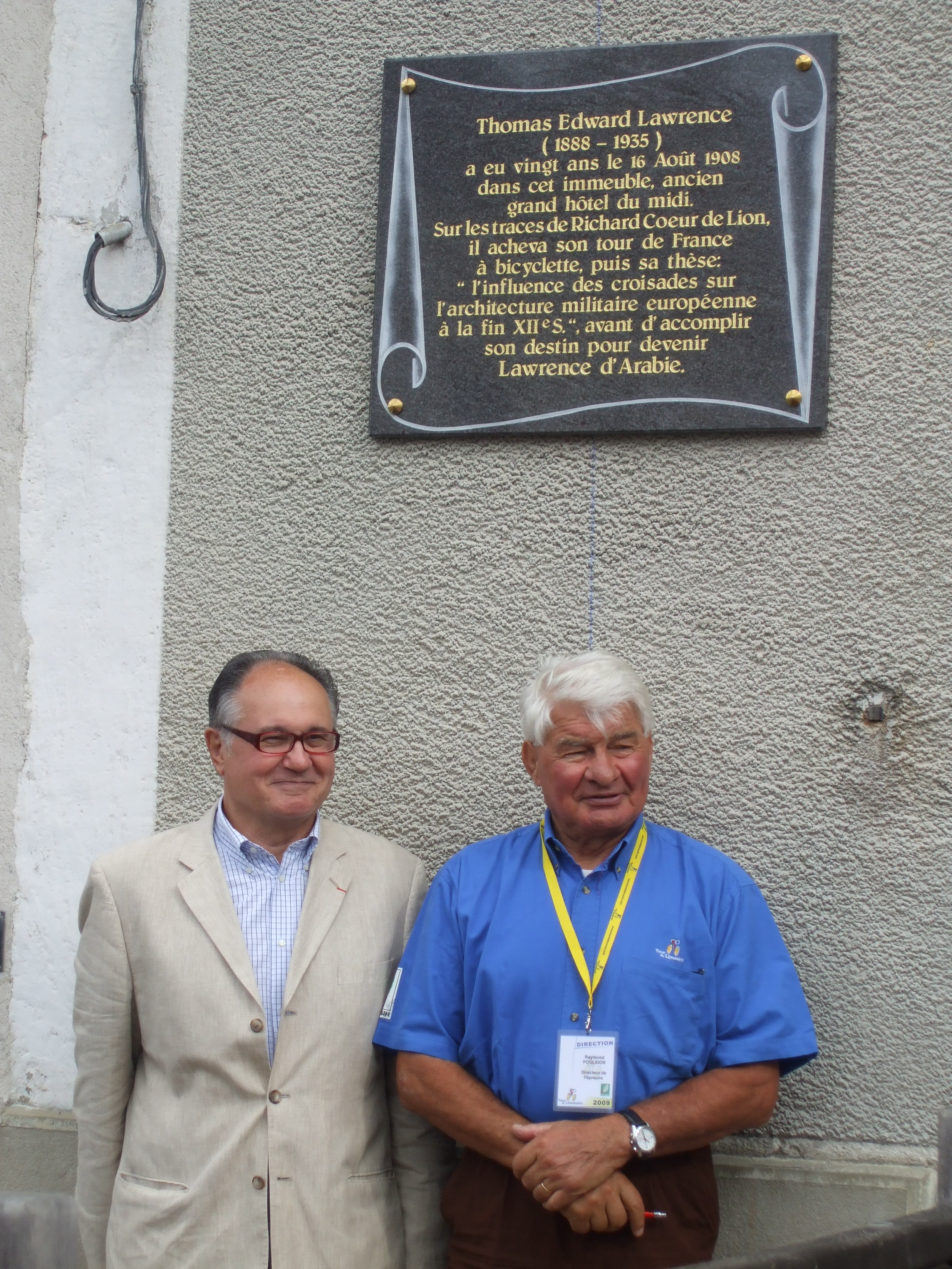 Inauguration le 21 août 2009 de la plaque commémorant le passage de Lawrence d'Arabie à Châlus (Haute-Vienne, France), par Raymond Poulidor et Guy Penaud, auteur du "Tour de France de Lawrence d'Arabie" (Editions de La Lauze).